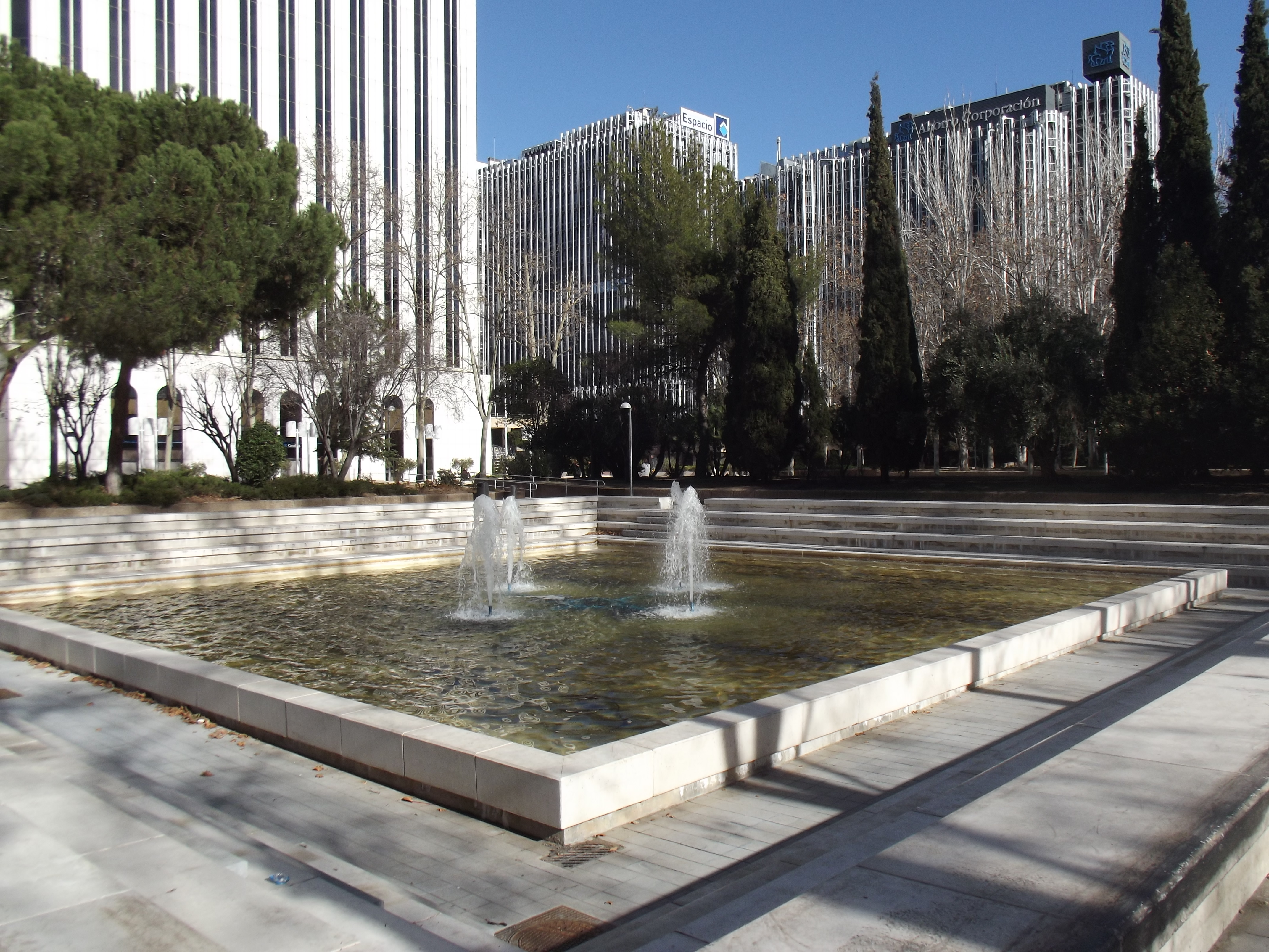 Fuente cuadrada de AZCA, Madrid.